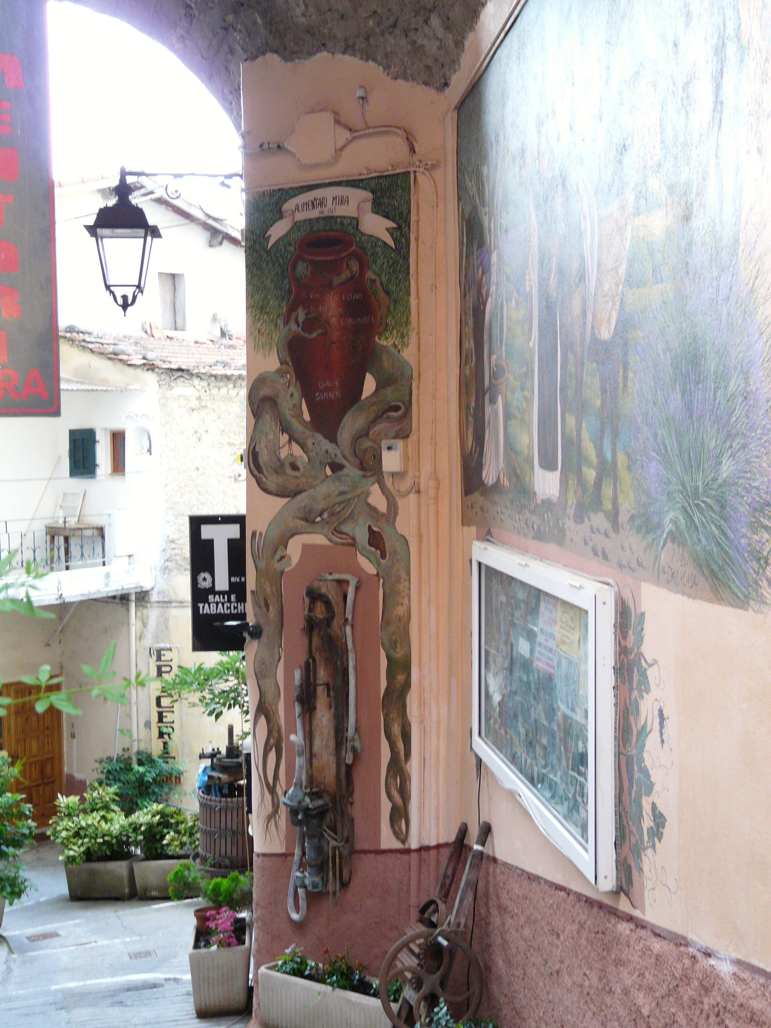 Affresco ad Olivetta San Michele, Liguria, Italia